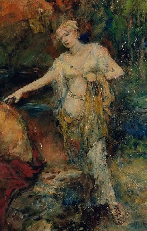 Iphigenie auf Tauris. Öl auf Leinwand. Ca. 64 x 86 cm.